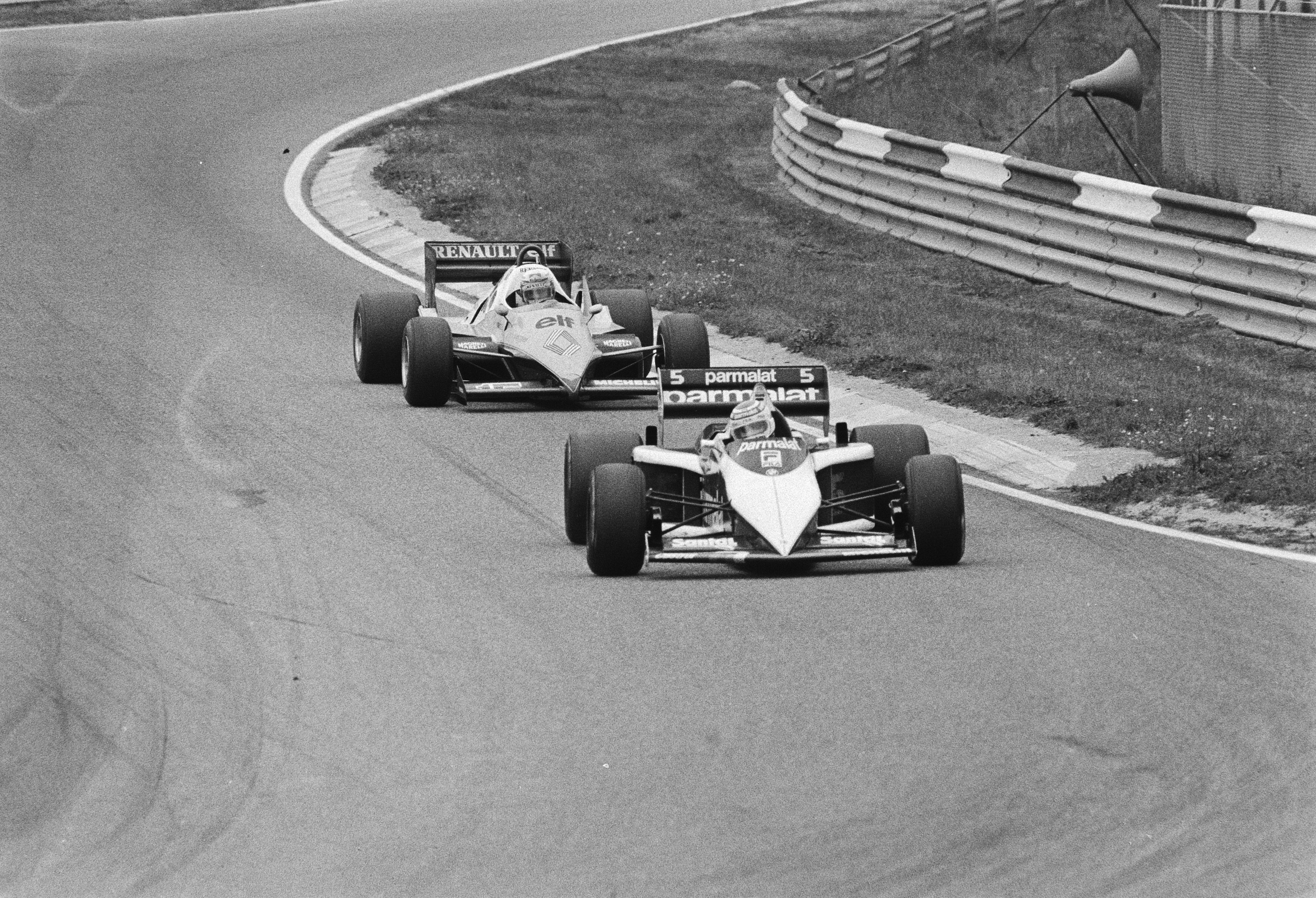 Piquet van het Brabhamteam achter Prost voor Renault in actie.